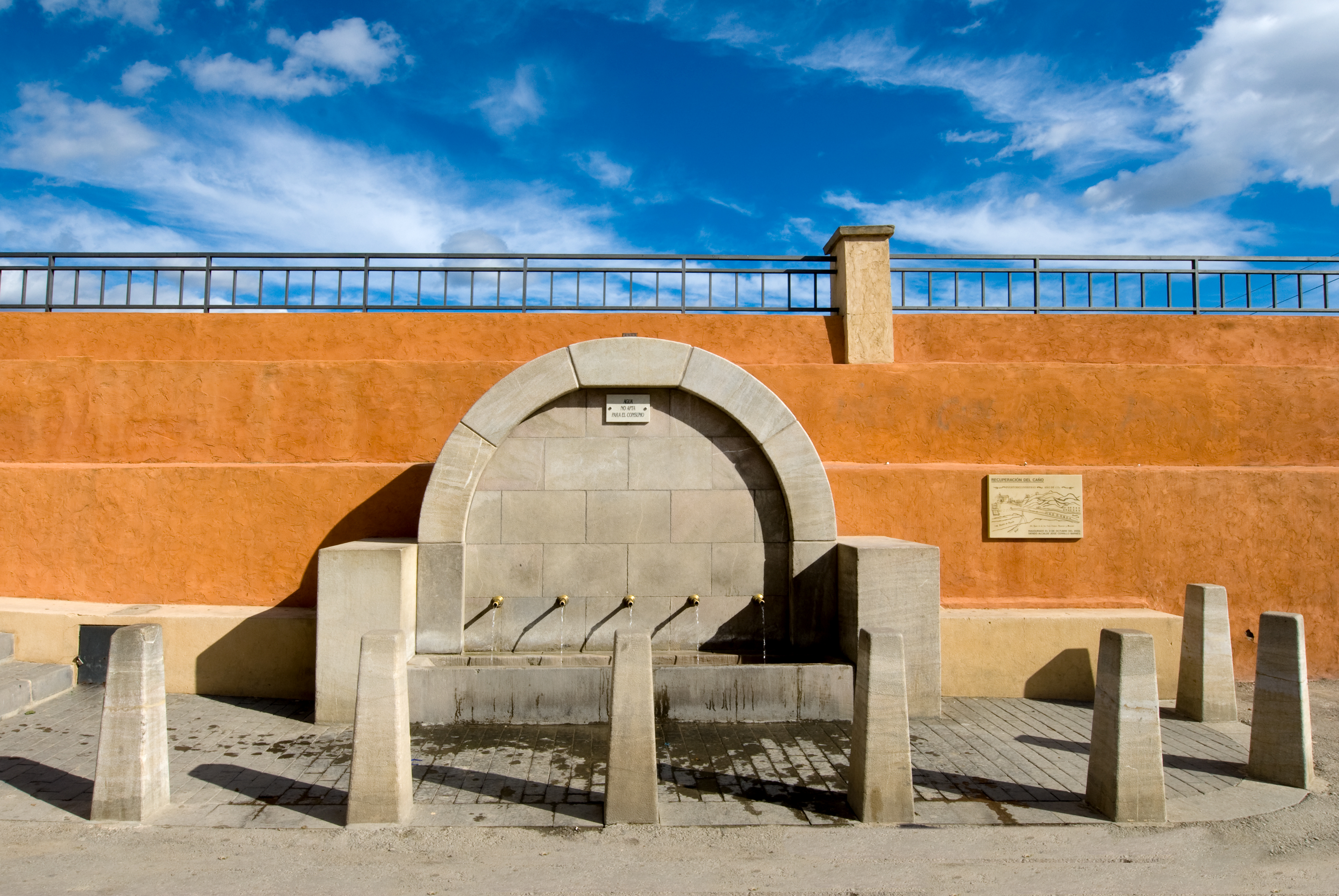 Vista frontal de la Fuente del Caño